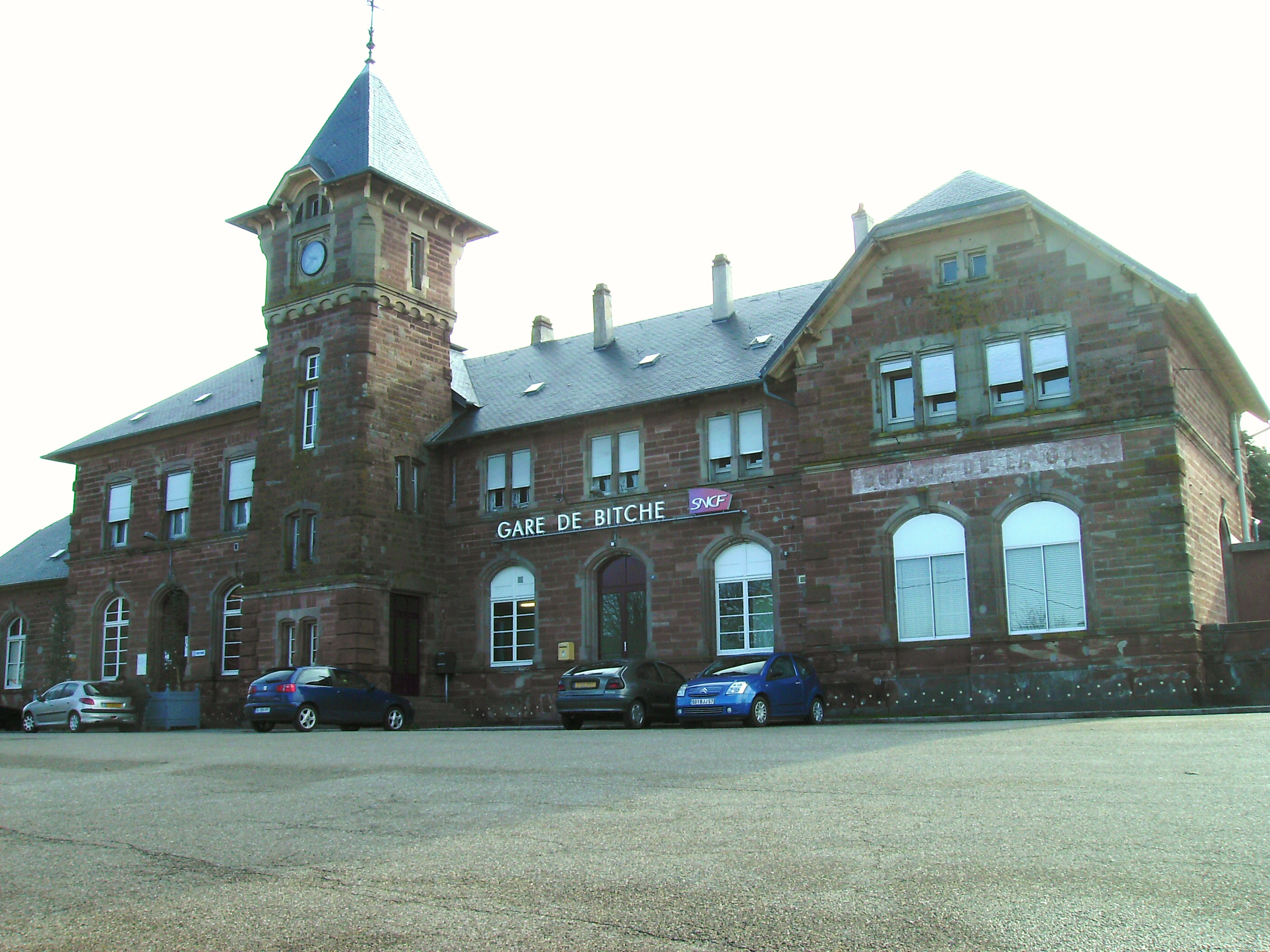 Bitche: Wilhelminischer Bahnhof